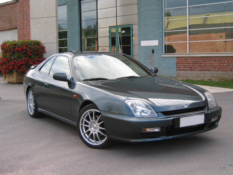 Honda Prelude